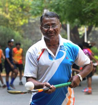 ಕನ್ನಡ: ಅರ್ಜುನ ಪ್ರಶಸ್ತಿ ಪುರಸ್ಕ್ರುತರು